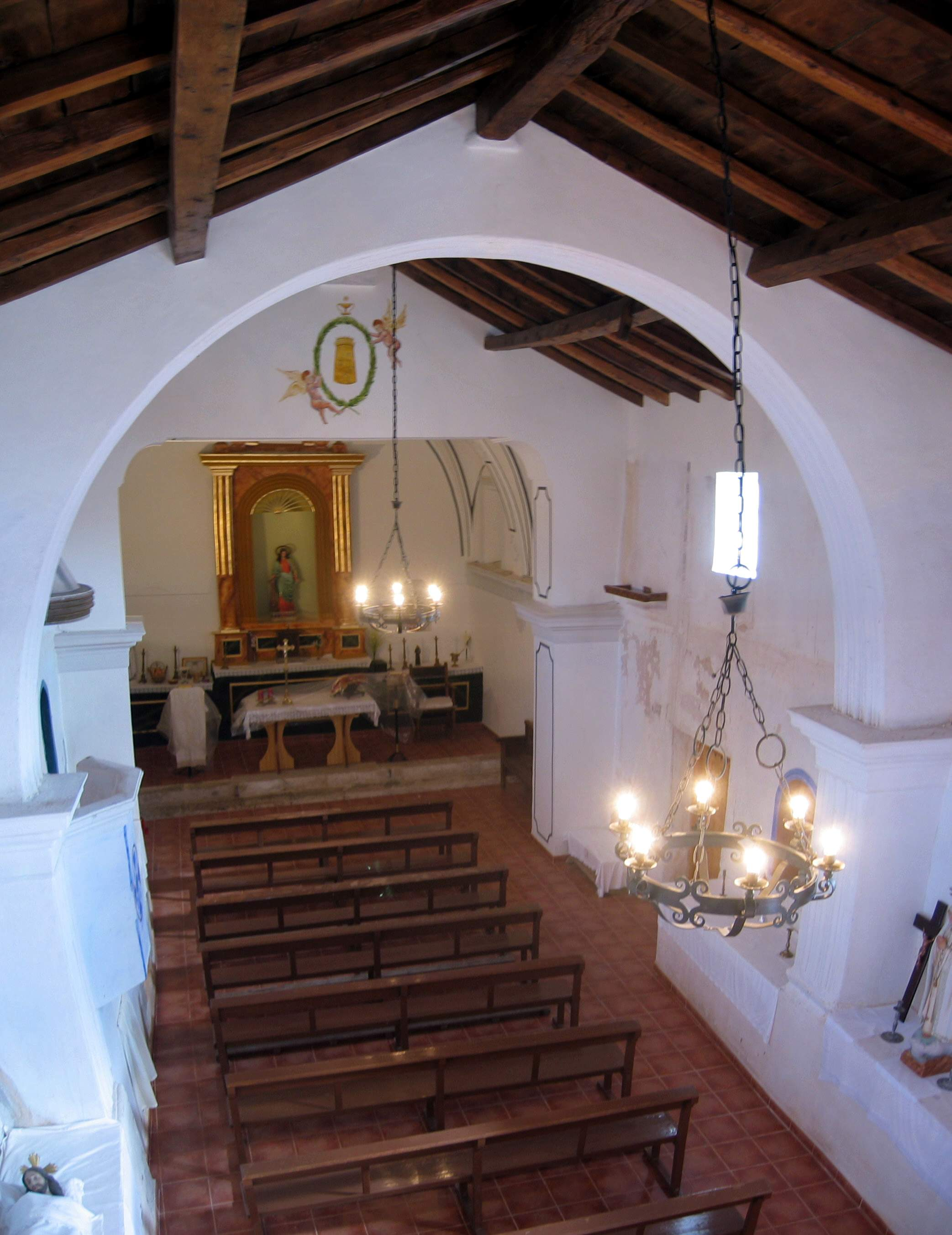 Vista interior de la parroquial de Santa Bárbara en Mas del Olmo, Ademuz (Valencia).